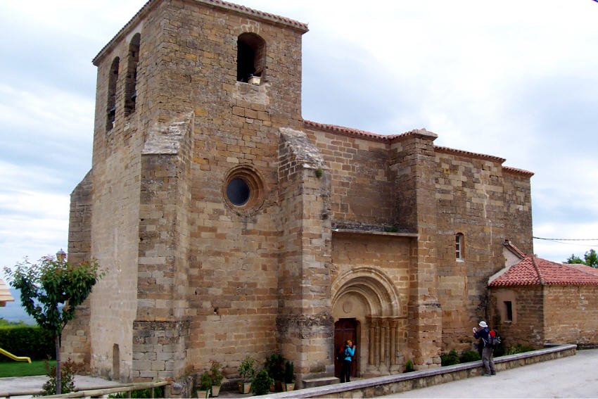 iglesia san andres de zariquiegui